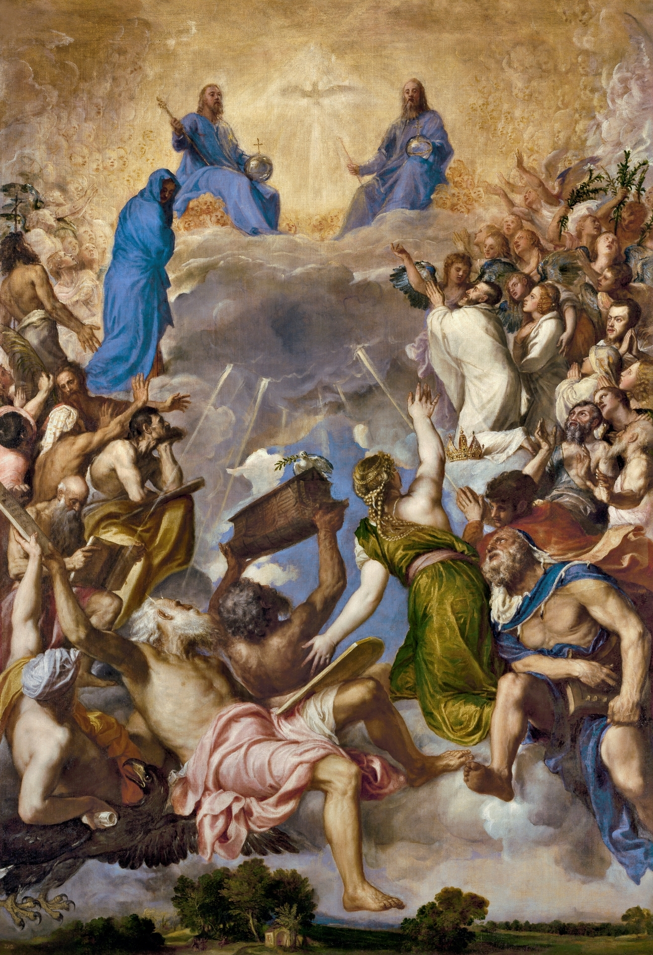 La obra representa a los tres miembros de la Santísima Trinidad junto a otros personajes, como la Virgen María, el emperador Carlos I de España, la emperatriz Isabel de Portugal y el rey Felipe II de España.